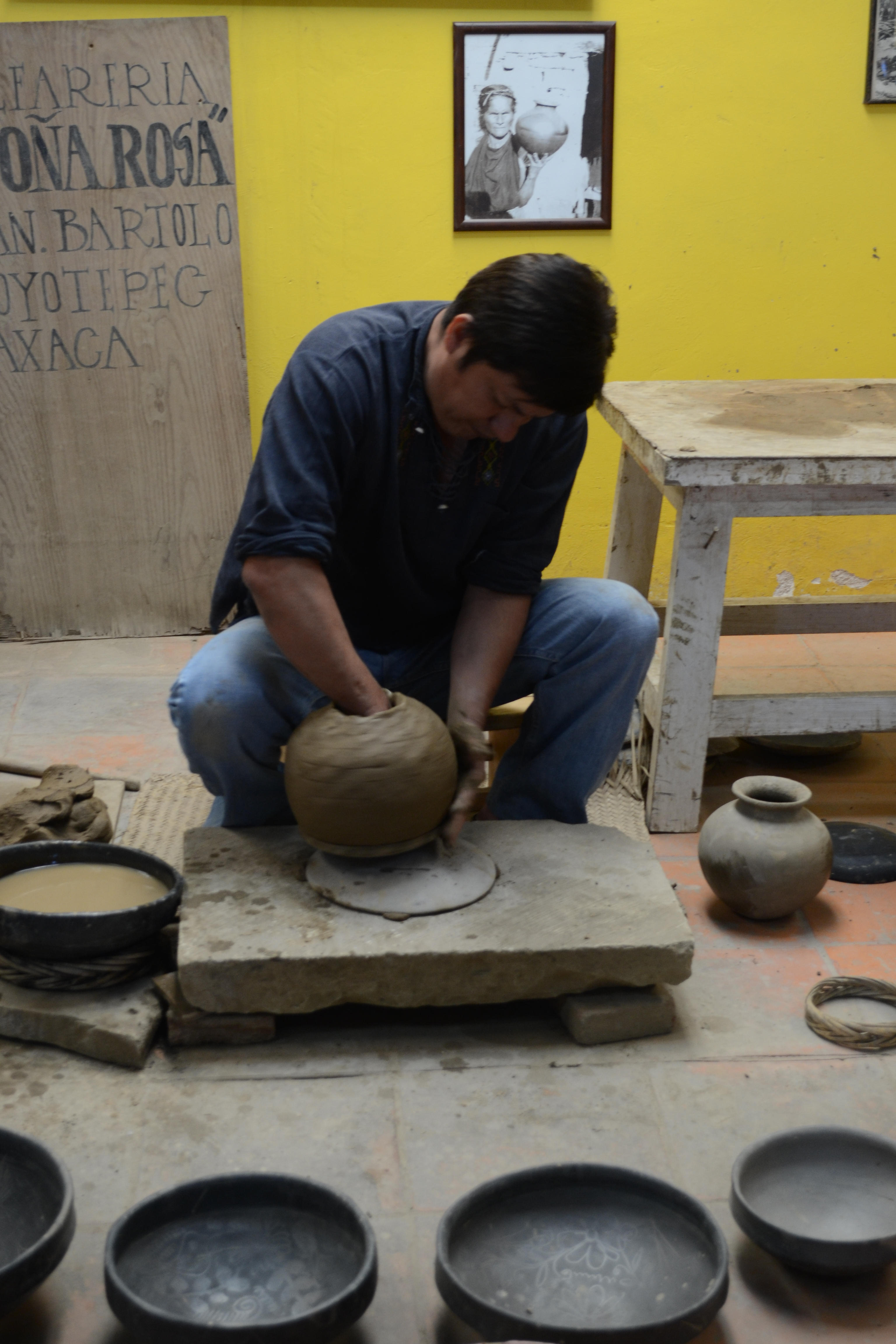 Proceso de la fabricación de "barro negro" en San Bartolo Coyotepec, Oaxaca.